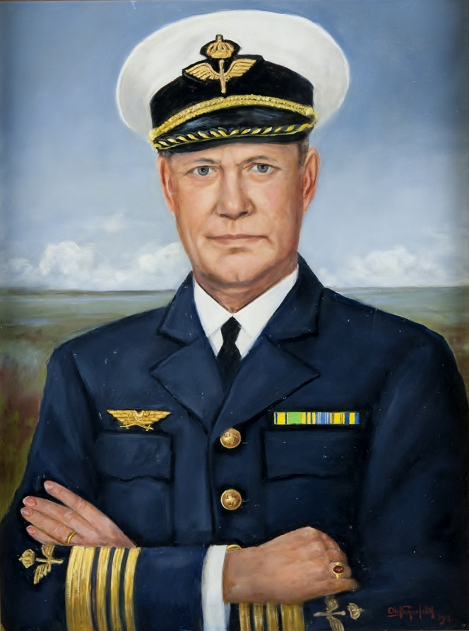 Porträtt målat i olja, föreställande Henrik Nordström, flottiljchef vid Västmanlands flygflottilj (F 1) tiden 1/10 1959-30/9 1964. Målningen är inramad med en guldfärgad träram. På baksidan finns en notering som lyder: Porträtt målat av konstnären Olof Segerfeldt, Stockholm. Överlämnat till officerskåren vid F 1 den 4/9 1964.